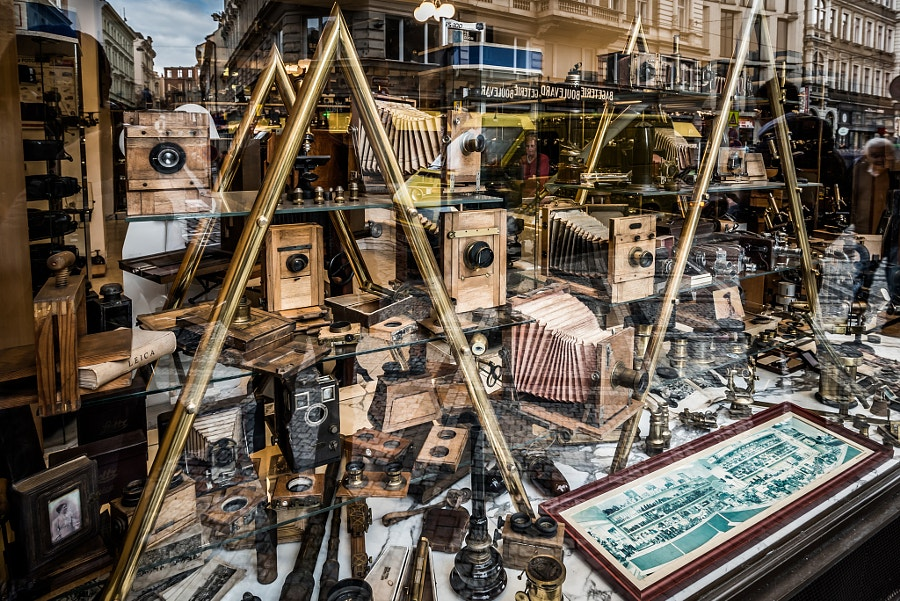 Магазин раритетных фотоаппаратов в Праге, Vodičkova 699/28, Praha-Nové Město.